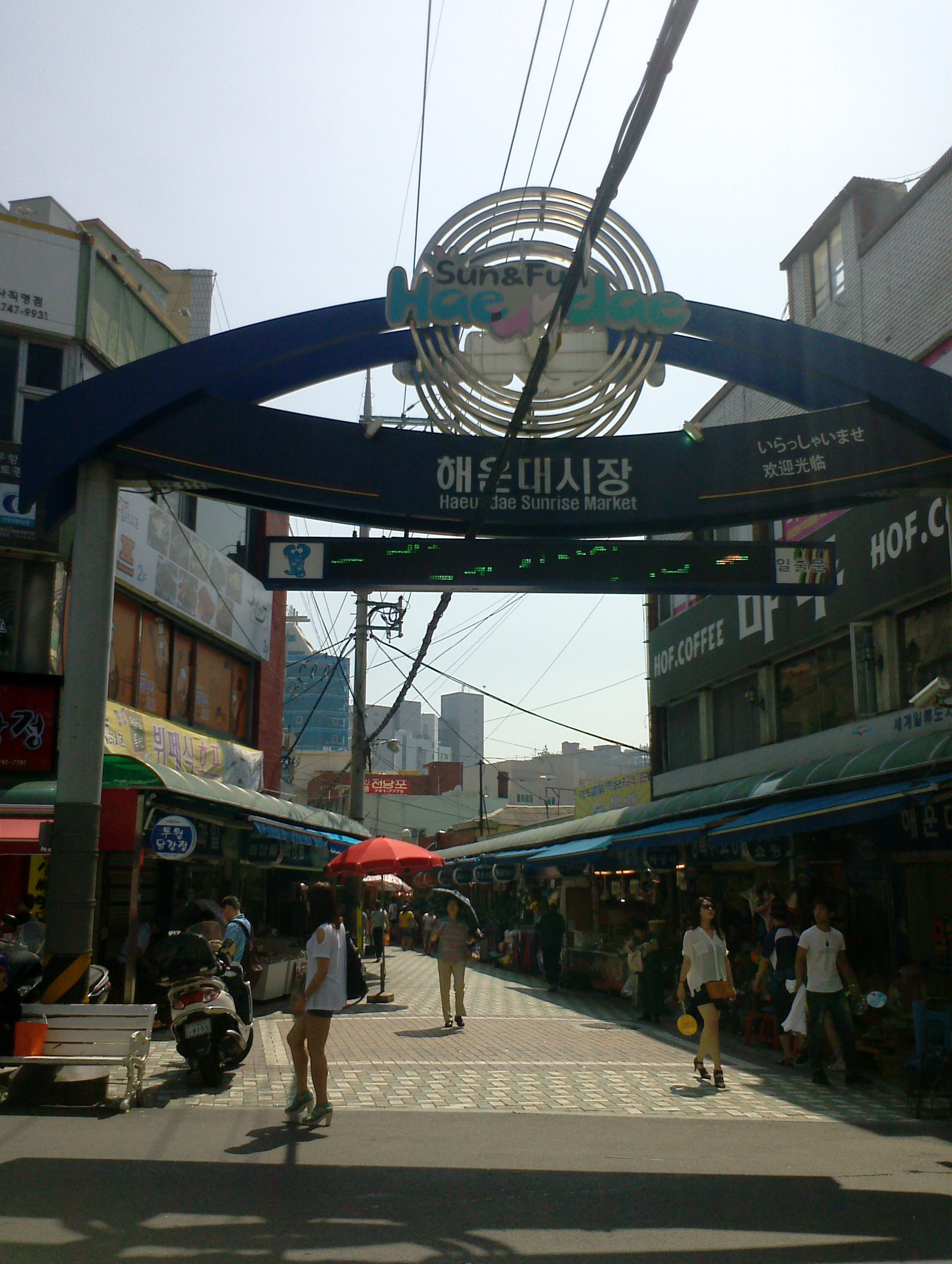 해운대시장